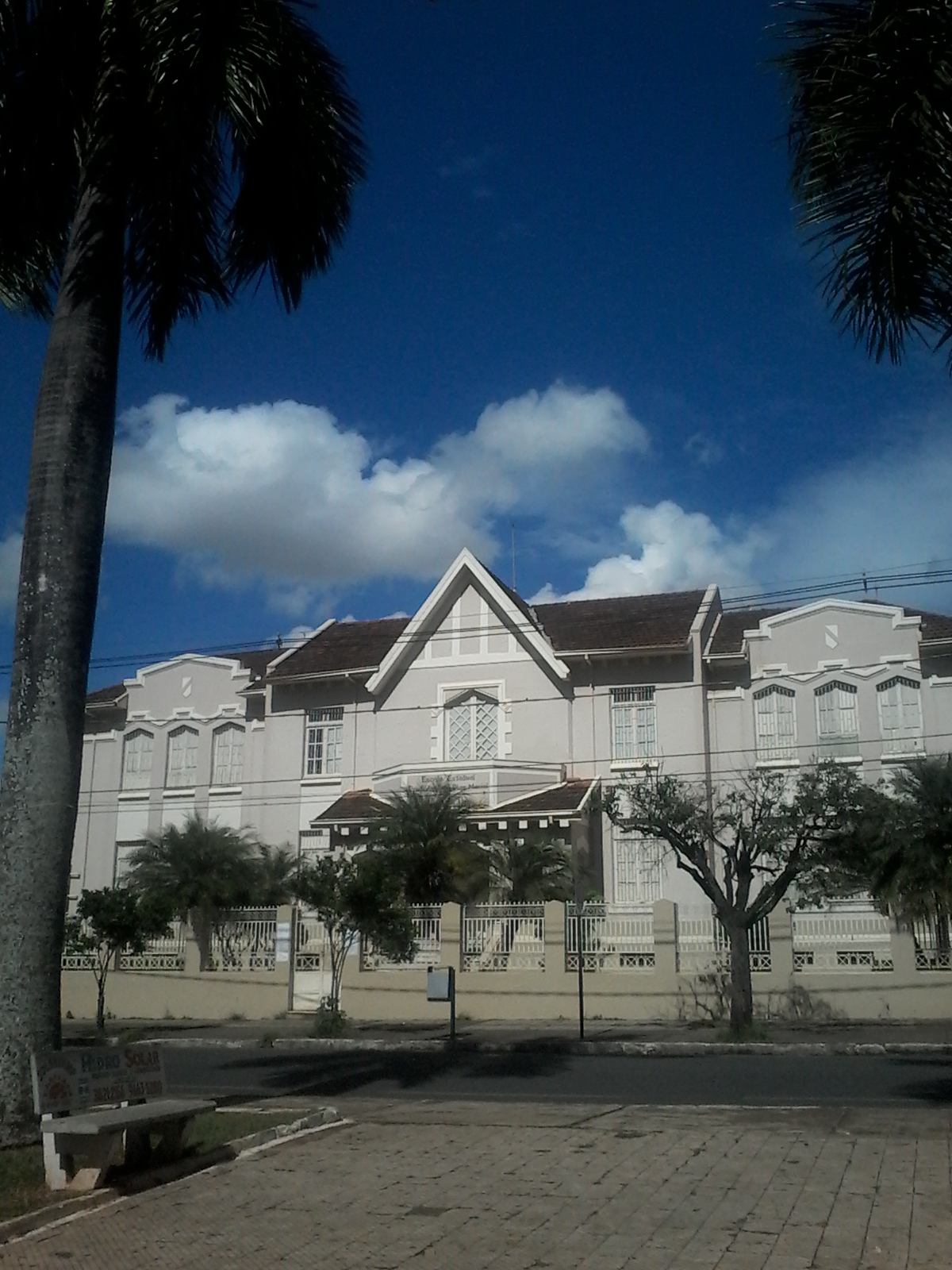 Escola Estadual Professor Antônio Dias Maciel, conhecida popularmente como Escola Normal, em Patos de Minas.